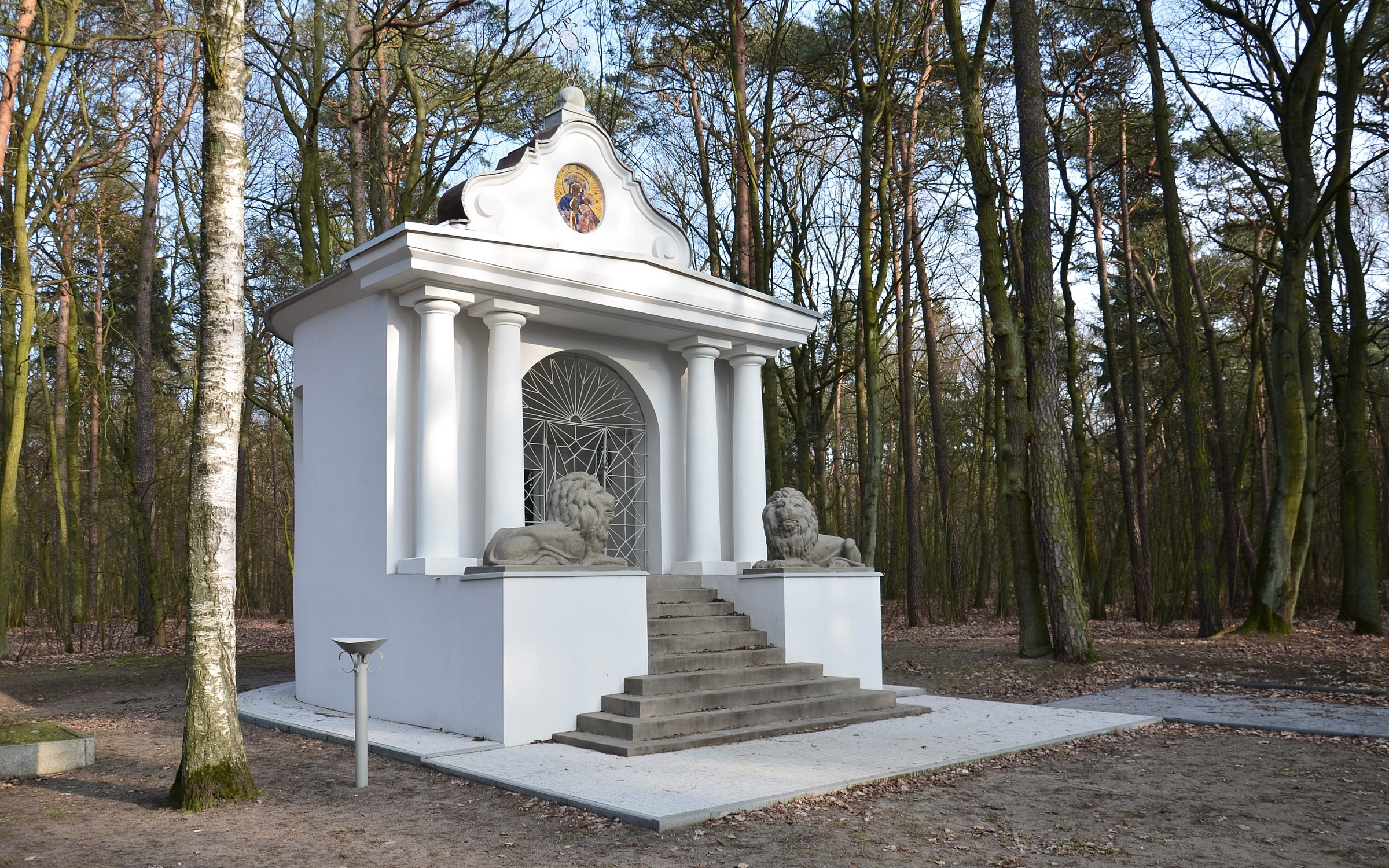 Kaplica pamięci ofiar bitwy pod Brodnicą w 1920 r.